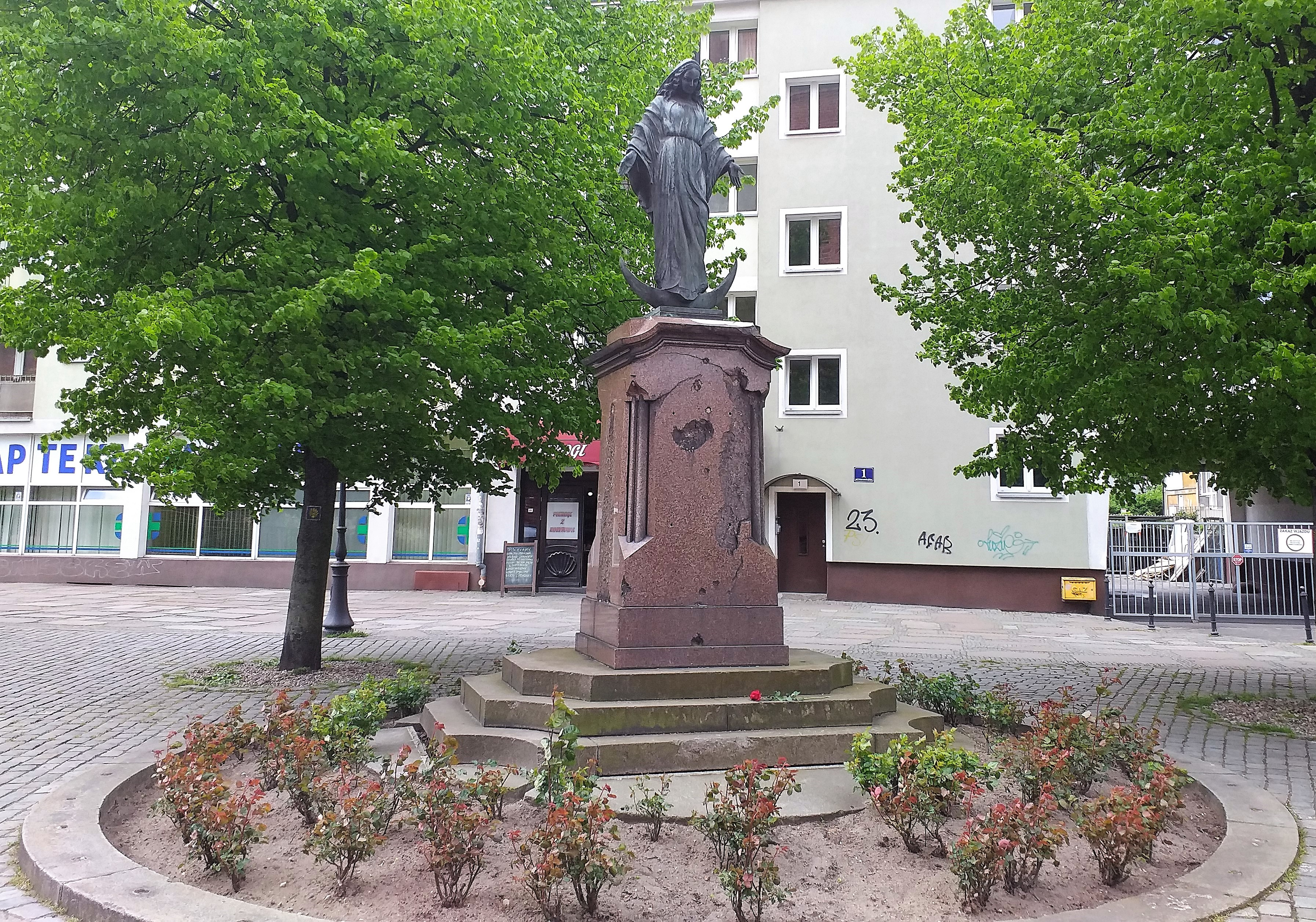 Figura Matki Boskiej w Szczecinie, 2020